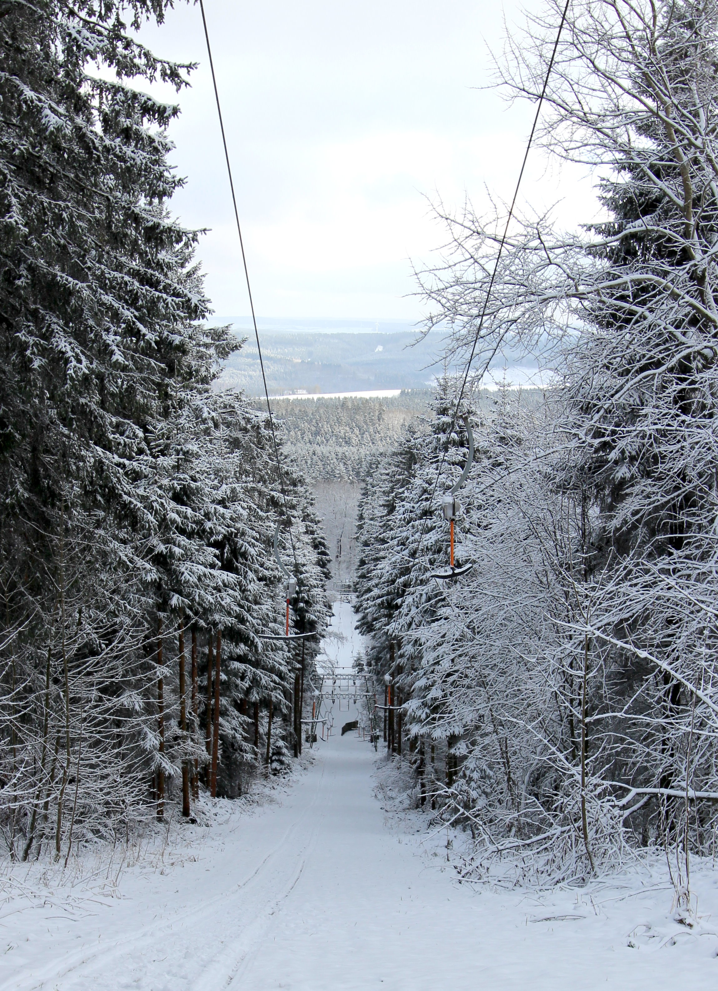 54595 Gondenbrett, Schwarzer Mann 1. Der Schwarze Mann bei Buchet-Halenfeld im rheinland-pfälzischen Eifelkreis Bitburg-Prüm ist mit 697,8 m ü. NHN nach einem nahen Gipfel mit 699,1 m Höhe die zweithöchste Erhebung der Schneifel. In Gipfelnähe befindet sich der Sender Schnee-Eifel. Die Umgebung ist ein gut erschlossenes Wandergebiet und das größte Wintersportgebiet in Rheinland-Pfalz. Aufnahme von 2017.